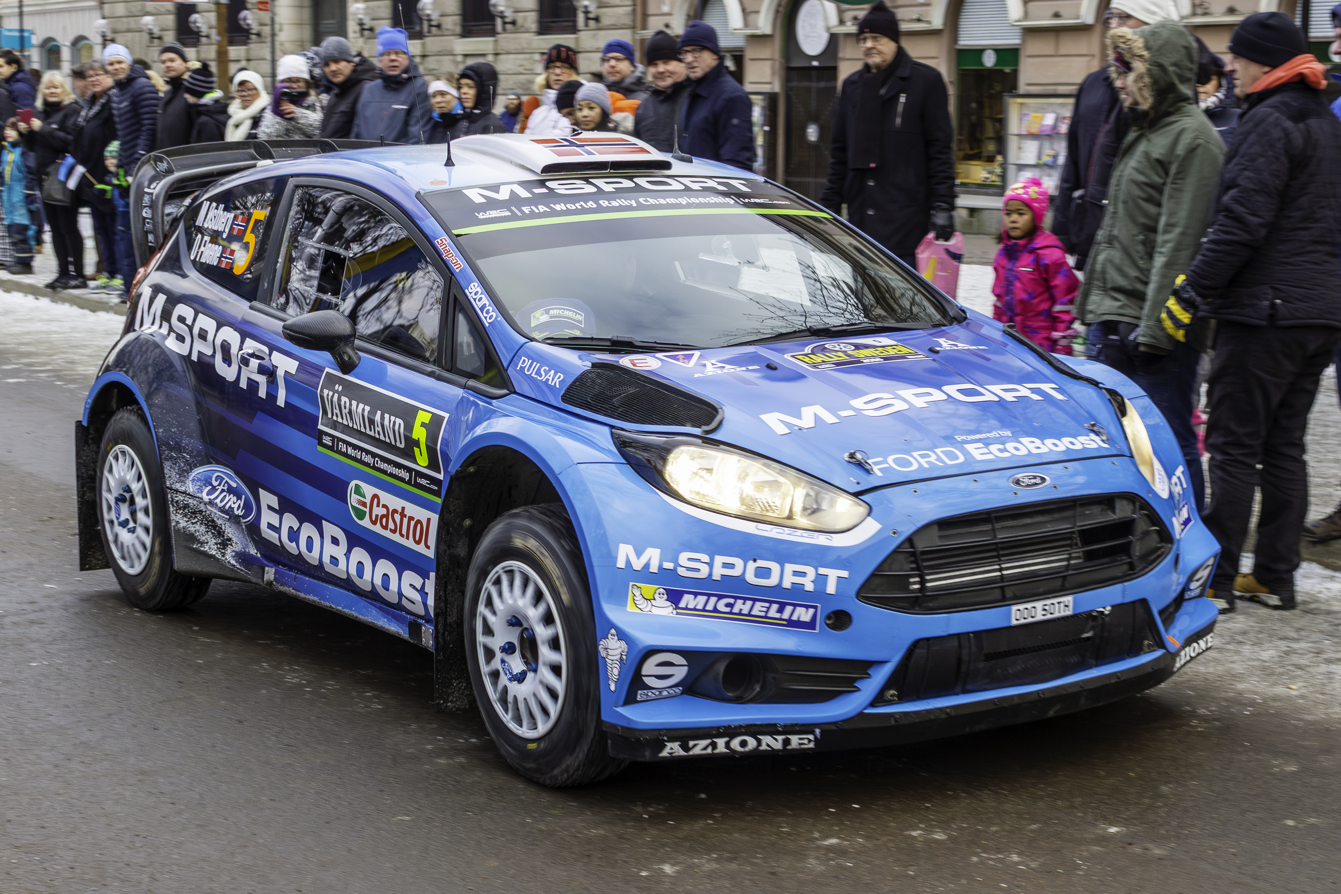 Ford Fiesta RS WRC de Mads Østberg en Karlstad durante o Ralli de Suecia 2016.